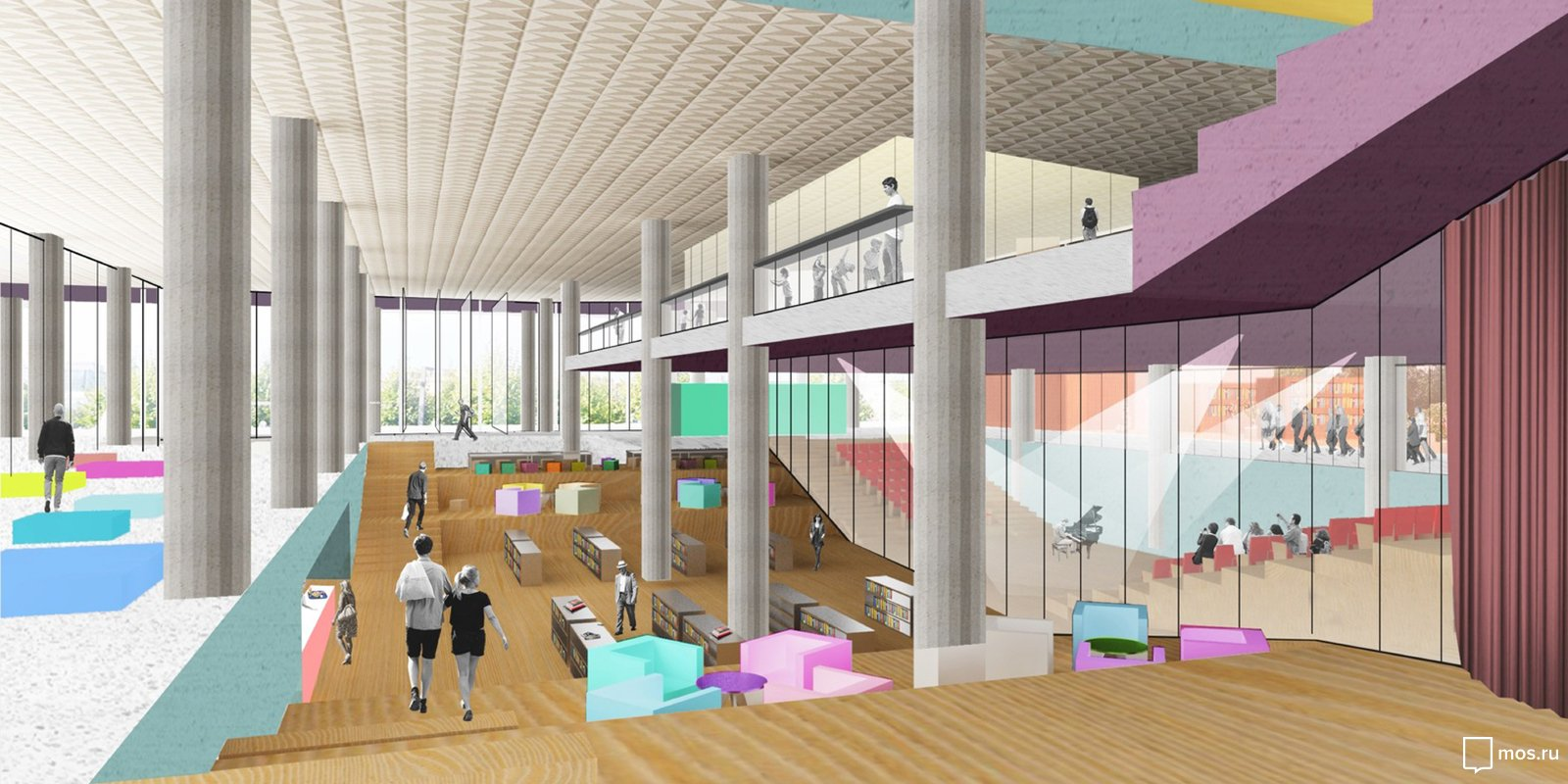 Проект реконструкции здания Новой Третьяковки, презентованный в феврале 2018 года